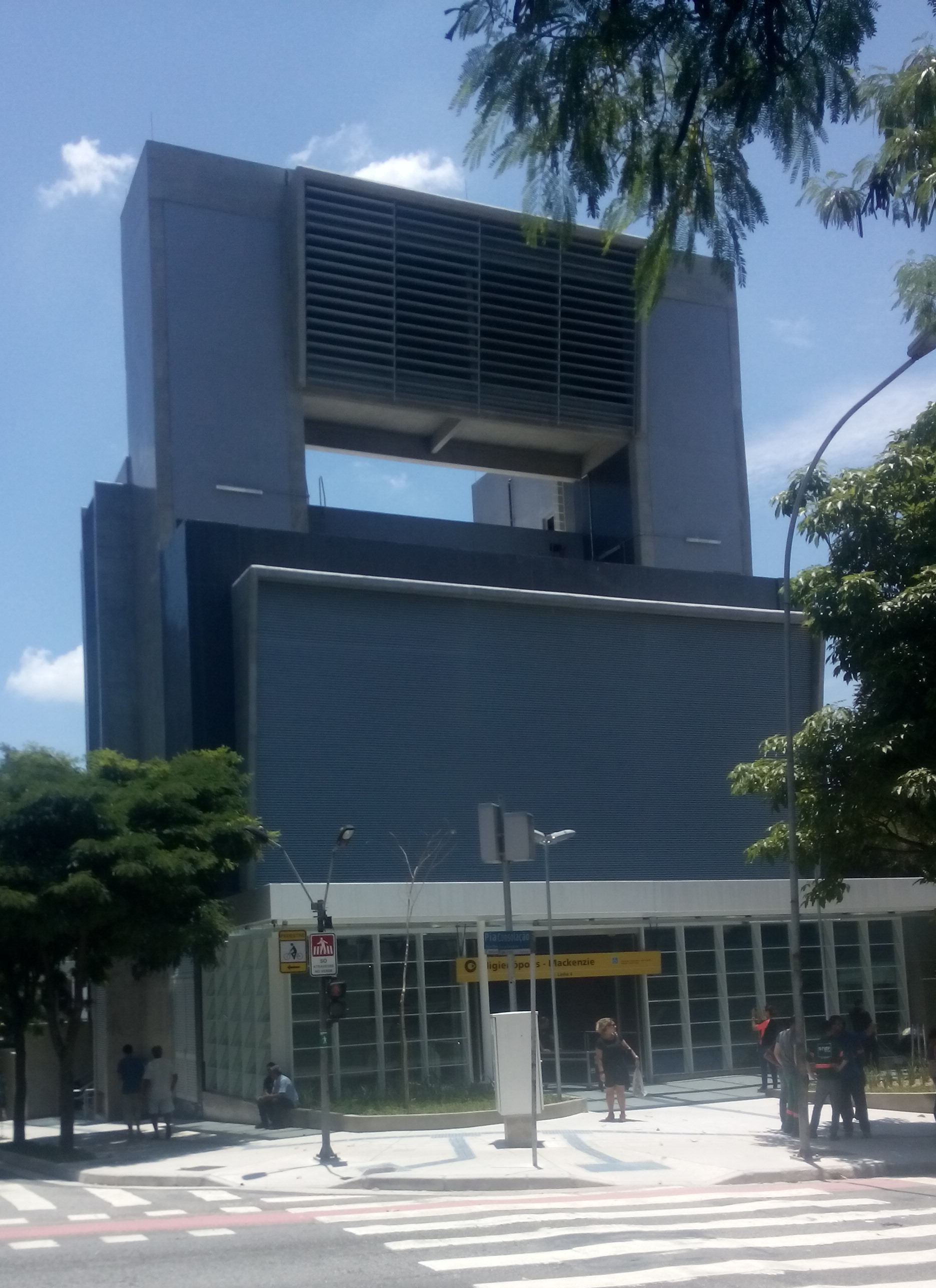 Estação Higienópolis-Mackenzie (Linha 4; ViaQuatro; São Paulo) no dia da inauguração